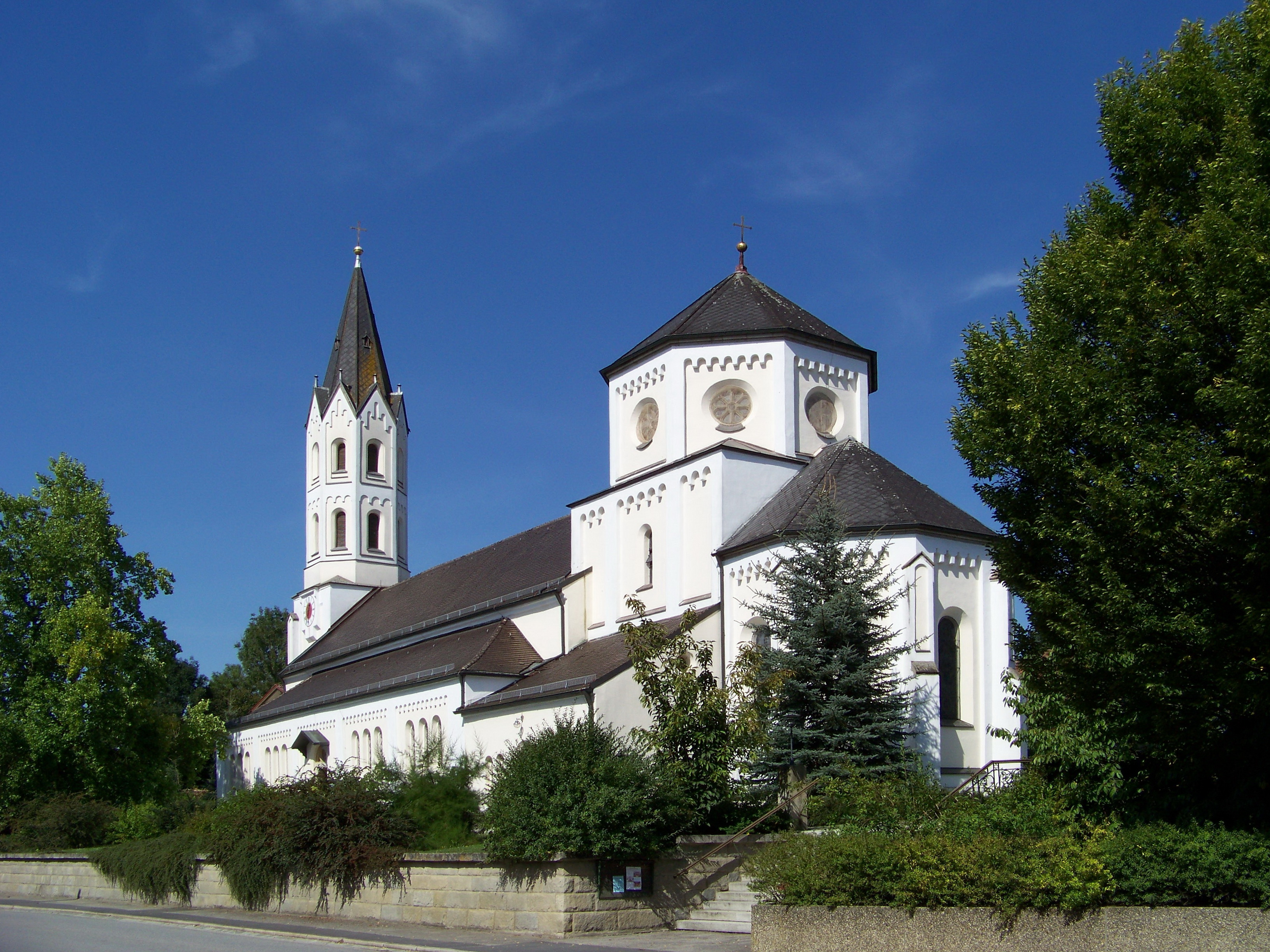 Oberschneiding, Reißing, Hauptstraße 44. Katholische Pfarrkirche Maria Immaculata, im Kern alte Bauteile, im 19. Jahrhundert nahezu neu erbaut; mit Ausstattung.